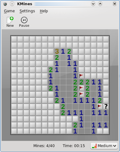 കെമൈൻസ് സ്ക്രീൻഷോട്ട്. ഗെയിം ഗ്നൂ സാർവ്വജനിക അനുവാദപത്രം അനുസരിച്ചുള്ളതും സ്ക്രീൻഷോട്ട് സ്വതന്ത്ര ഓപ്പറേറ്റിംഗ് സിസ്റ്റമായ ഉബുണ്ടുവിൽ എടുത്തതുമാണ്‌